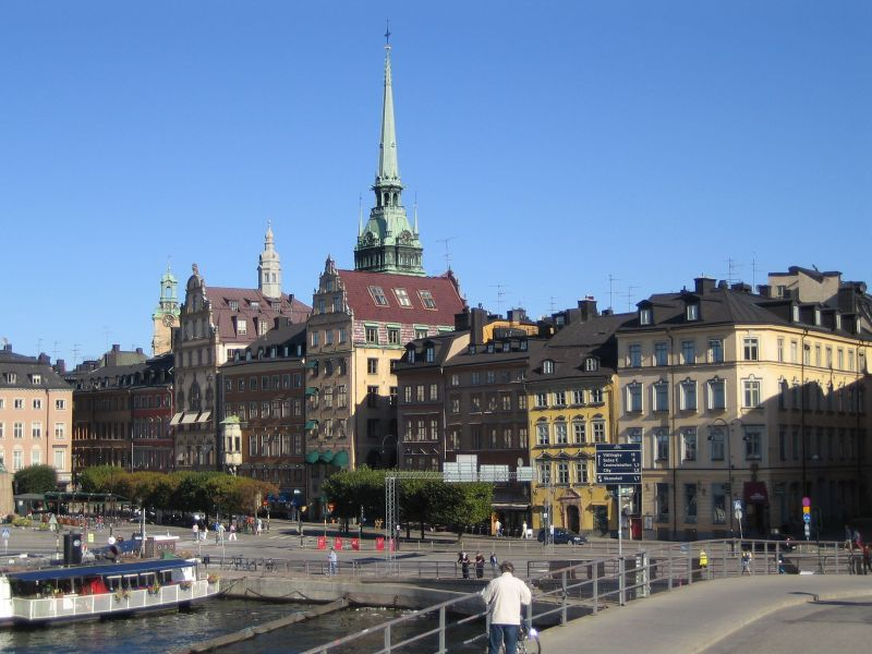 Kornhamnstorg, Gamla stan, Stockholm